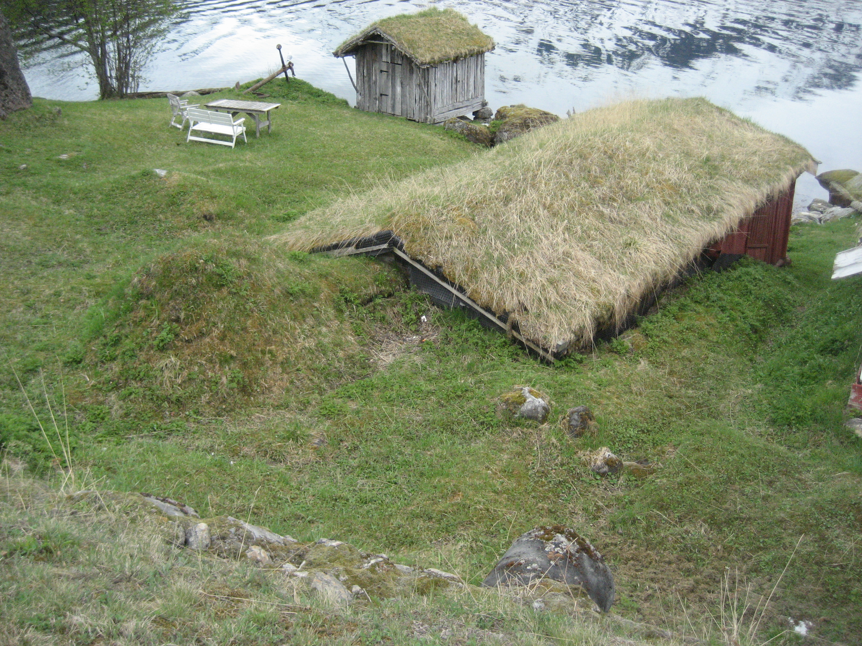 Naust med torvtak, gamme i enden. Reklingbu i bakgrunnen